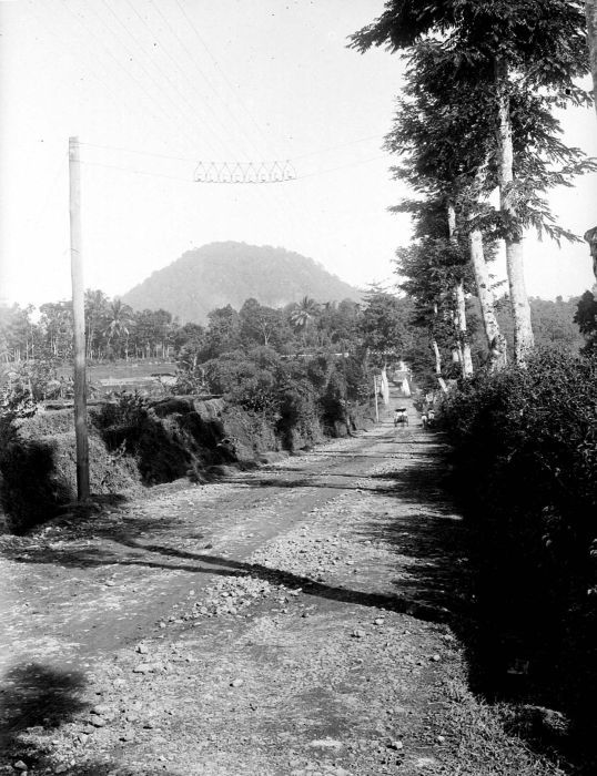 Repronegatief. Weg van Buitenzorg naar Leiwiliang, Java